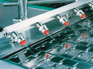 Getränkeindustrie - Düsen im Einsatz